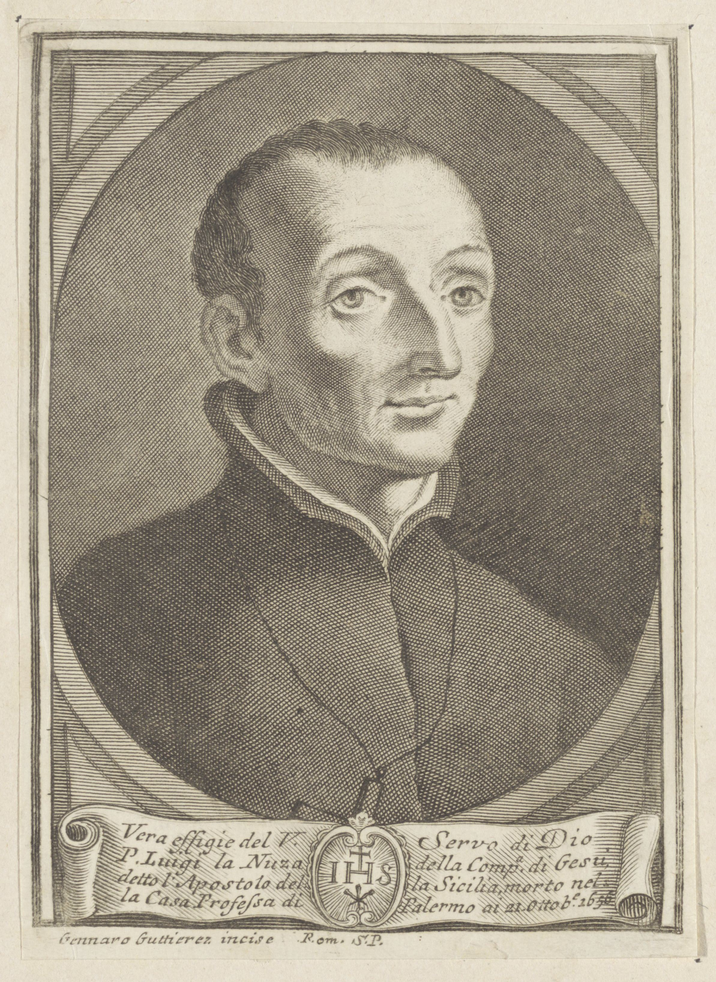 IdentificatieTitel(s): Portret van geestelijke Luigi la NuzaObjecttype: prent Objectnummer: RP-P-1909-4976VervaardigingVervaardiger: prentmaker: Gennaro Guttierez (vermeld op object)Plaats vervaardiging: ItaliëDatering: 1700 - 1799Fysieke kenmerken: gravureMateriaal: papier Techniek: graveren (drukprocedé)Afmetingen: blad: h 169 mm × b 120 mmOnderwerpWat: historical personsWie: Luigi la NuzaVerwerving en rechtenVerwerving: aankoop 1905Copyright: Publiek domein